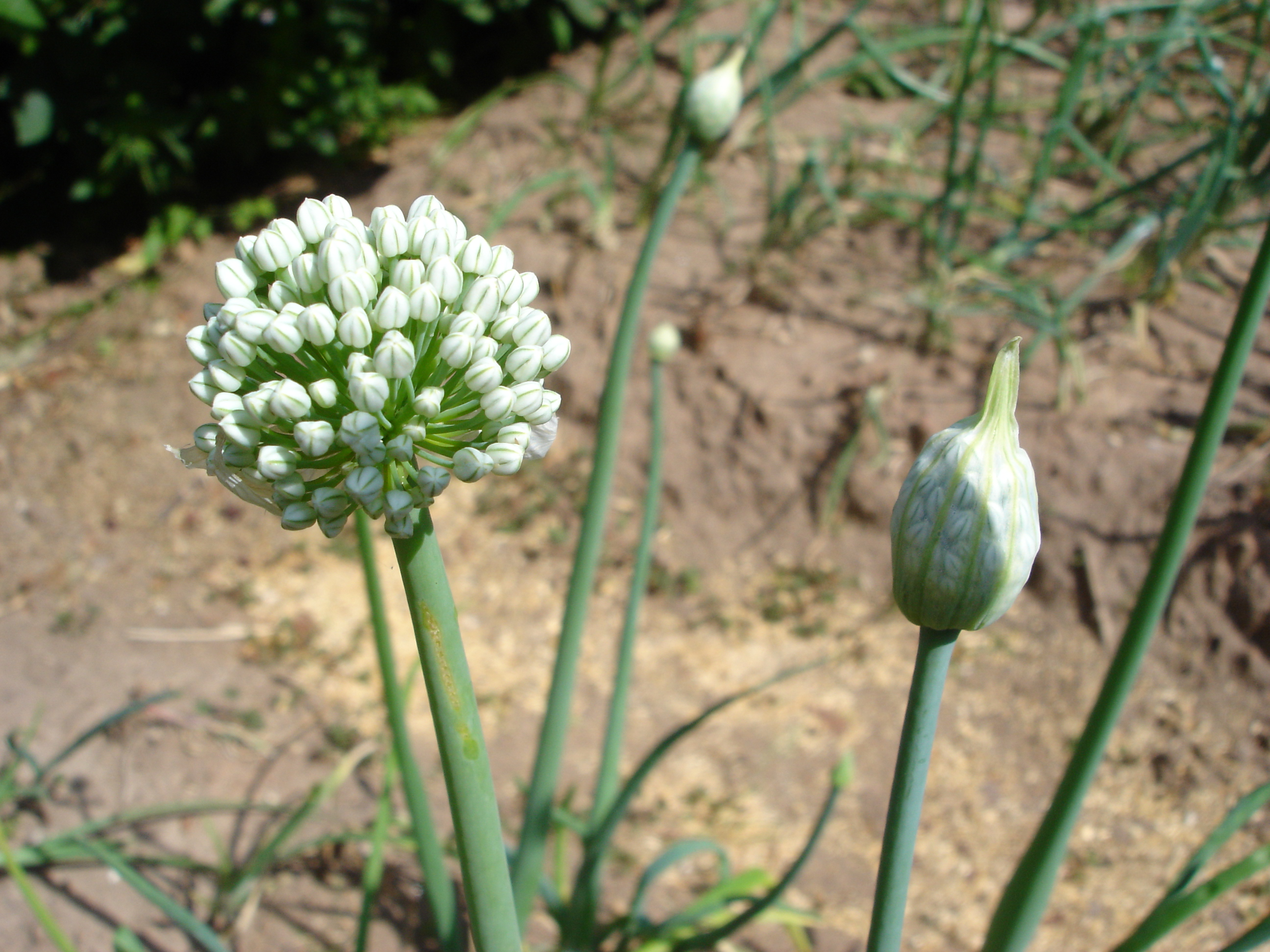 Zwiebelblüten, (Allium cepa) links geöffnet, rechts noch geschlossen